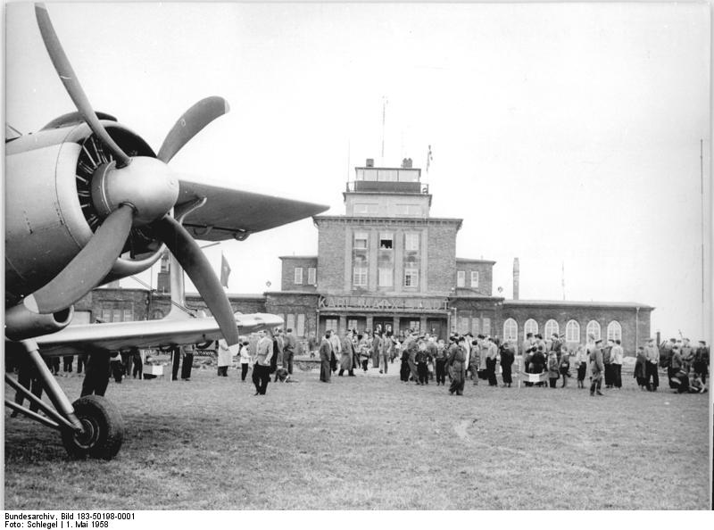 Chemnitz, Flughafen Zentralbild Schlegel Web-Schä 1.5.1958 Flughafen der Deutschen Interflug in Karl-Marx-Stadt eröffnet In Karl-Marx-Stadt wurde am 30.4.1958 ein Flughafen der Deutschen Interflug eröffnet. Damit wurde Karl-Marx-Stadt an das innerdeutsche und internationale Flugnetz angeschlossen. UBz: Das Gebäude des Flugahfens Karl-Marx-Stadt im Vordergrund ein Maschine vom Typ Antonow An-2.